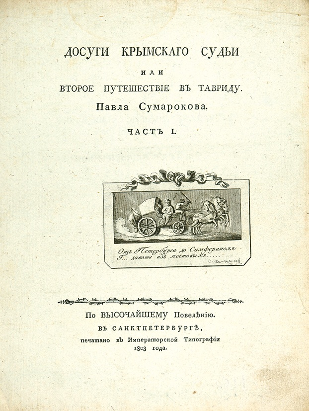 Досуги Крымскаго Судьи Обложка Павел Сумароков 1803 СПб